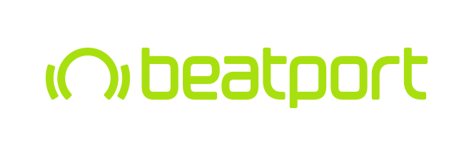 es una imagen de (la pagina te permite descargarlas desde su pagina web)